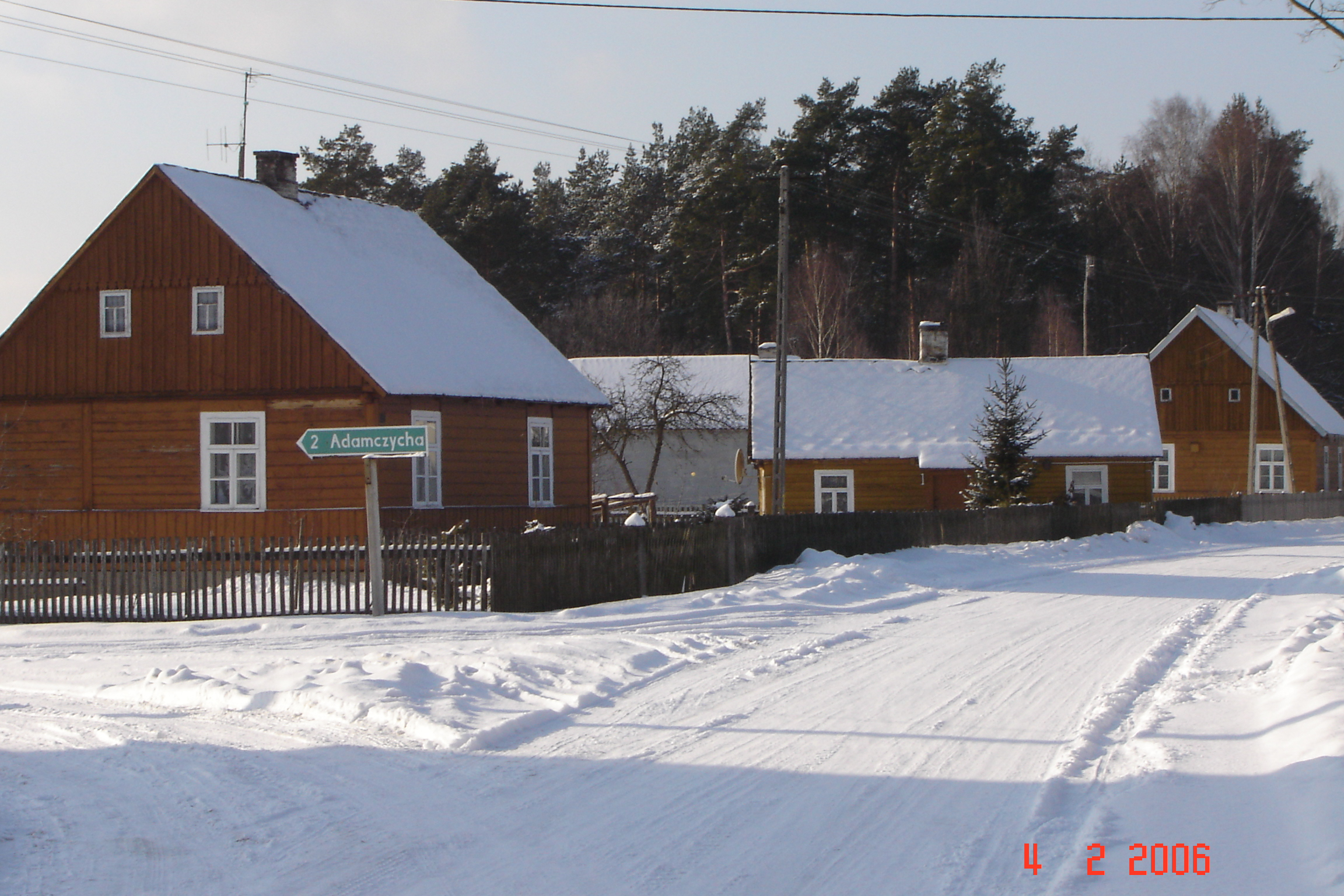 Dłutówka zimą